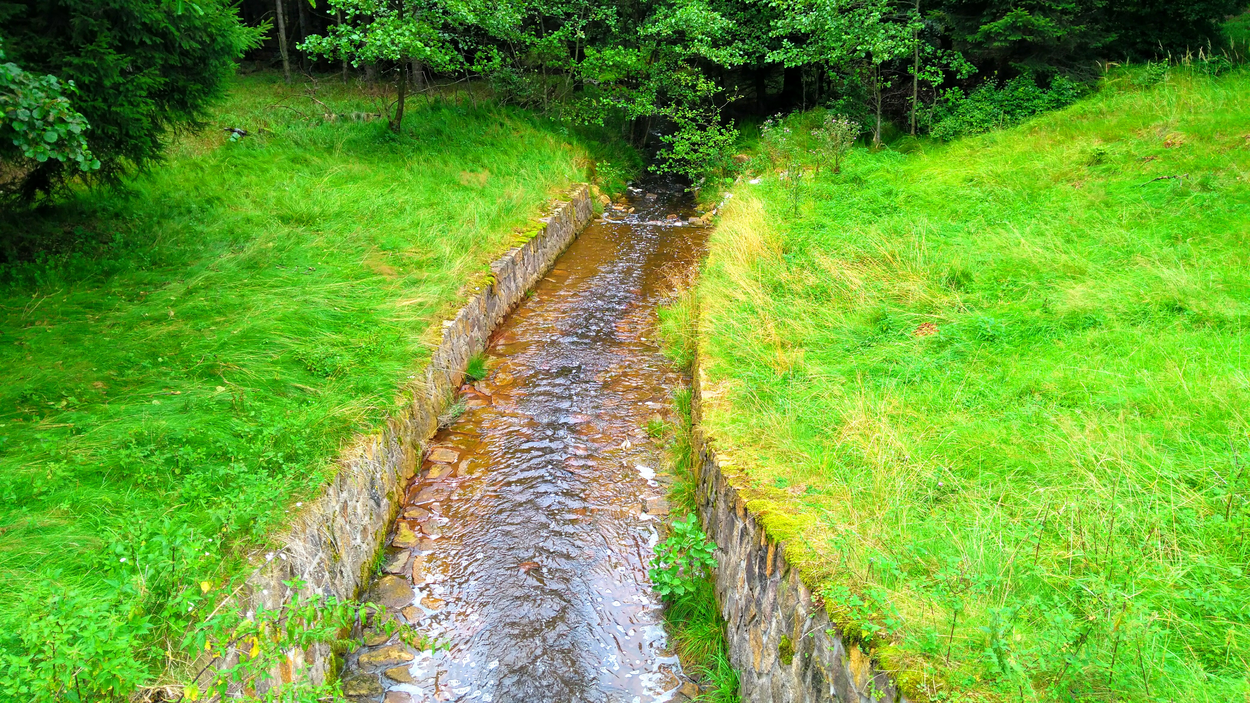 Potok.